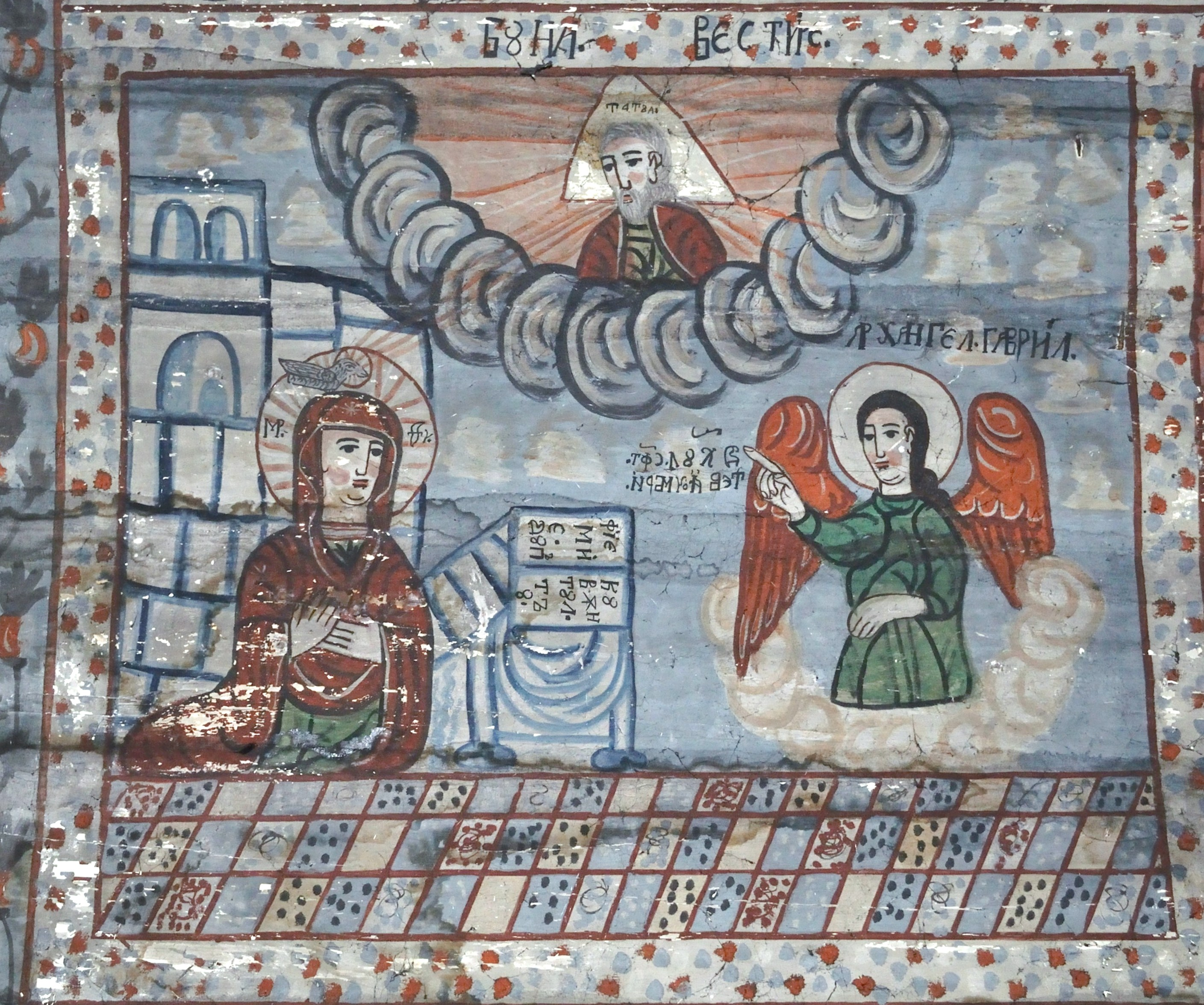 Biserica de lemn din Agârbiciu, județul Cluj